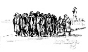 "Auf dem Weg nach Nisnij Postiolok", Kohleskizze, Bruno Bergner, 1948